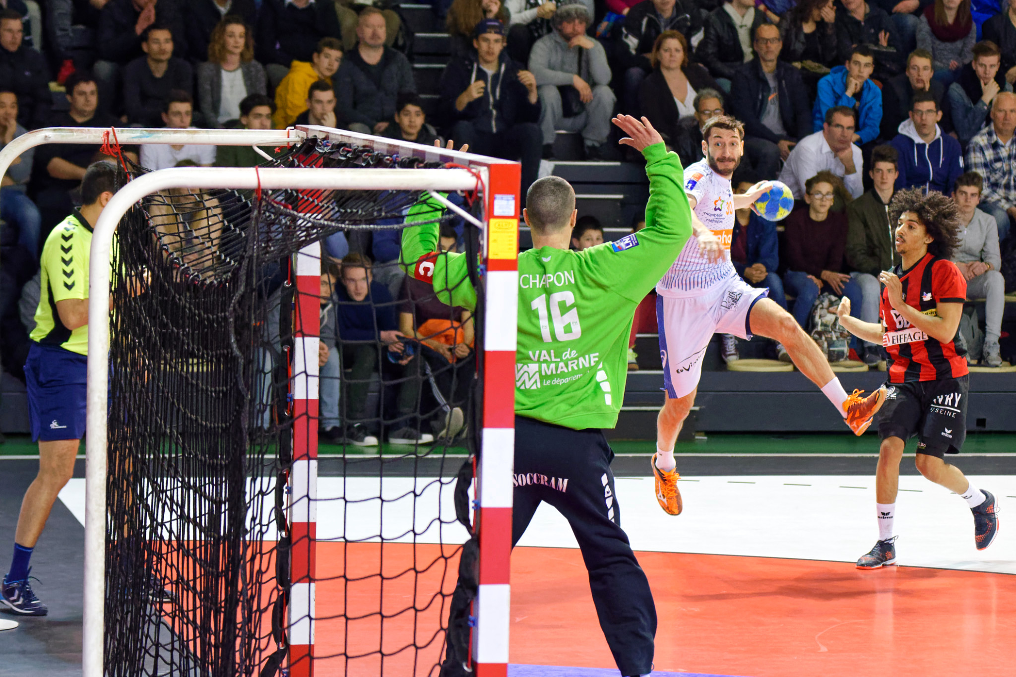 Rencontre du championnat de LNH entre l'US Ivry et Montpellier. A Ivry, le 17 mars 2016.